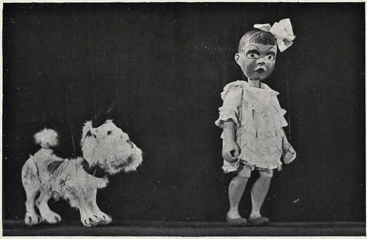 Jedna z nejstarších (ne-li nejstarší) fotografie Žeryka a Máničky ze hry "Revue z donucení" hrané v Praze v květnu 1930